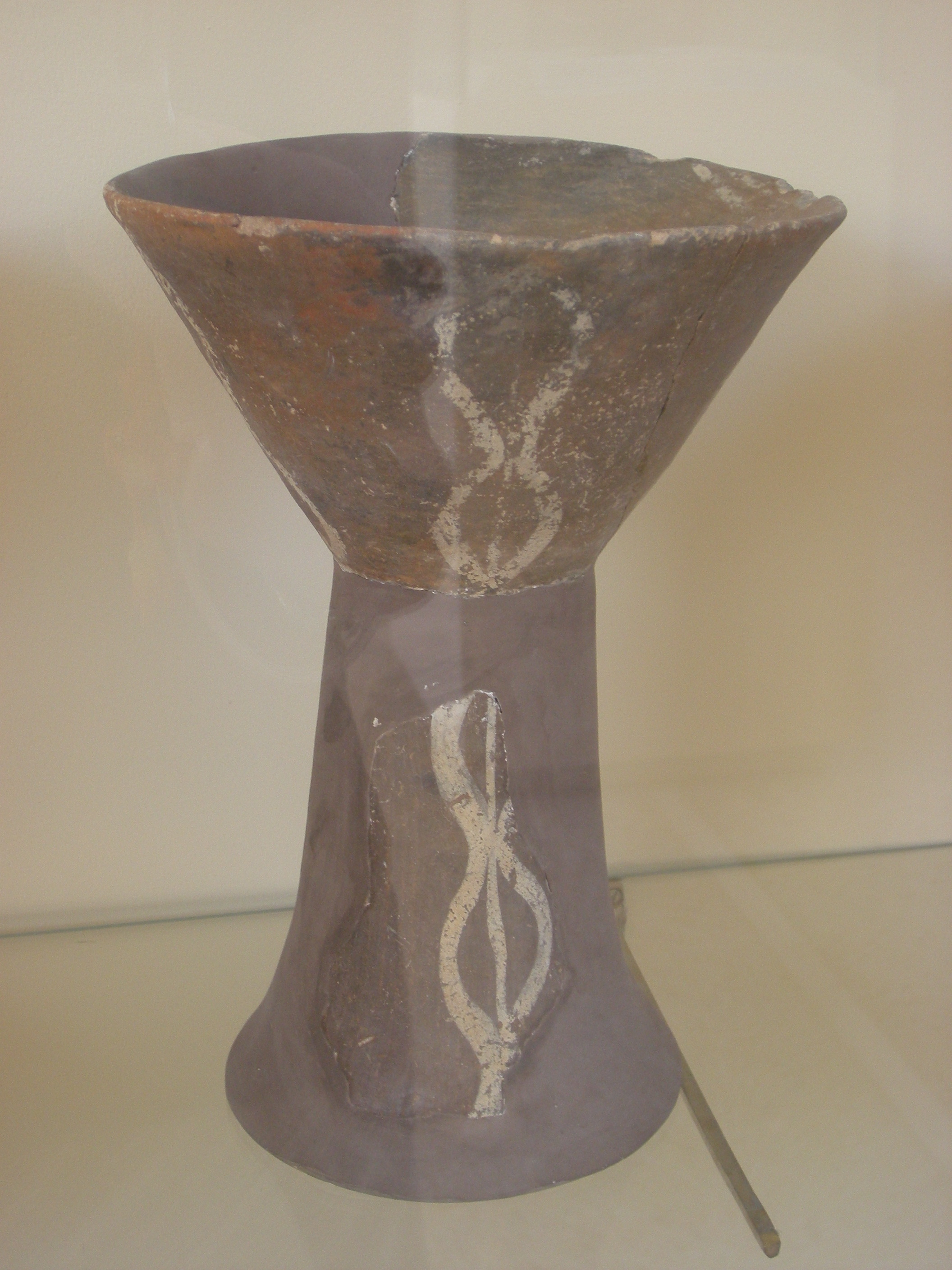 Calice préhistorique (4ème millénaire avant J. C.) Saliangos, Paros.